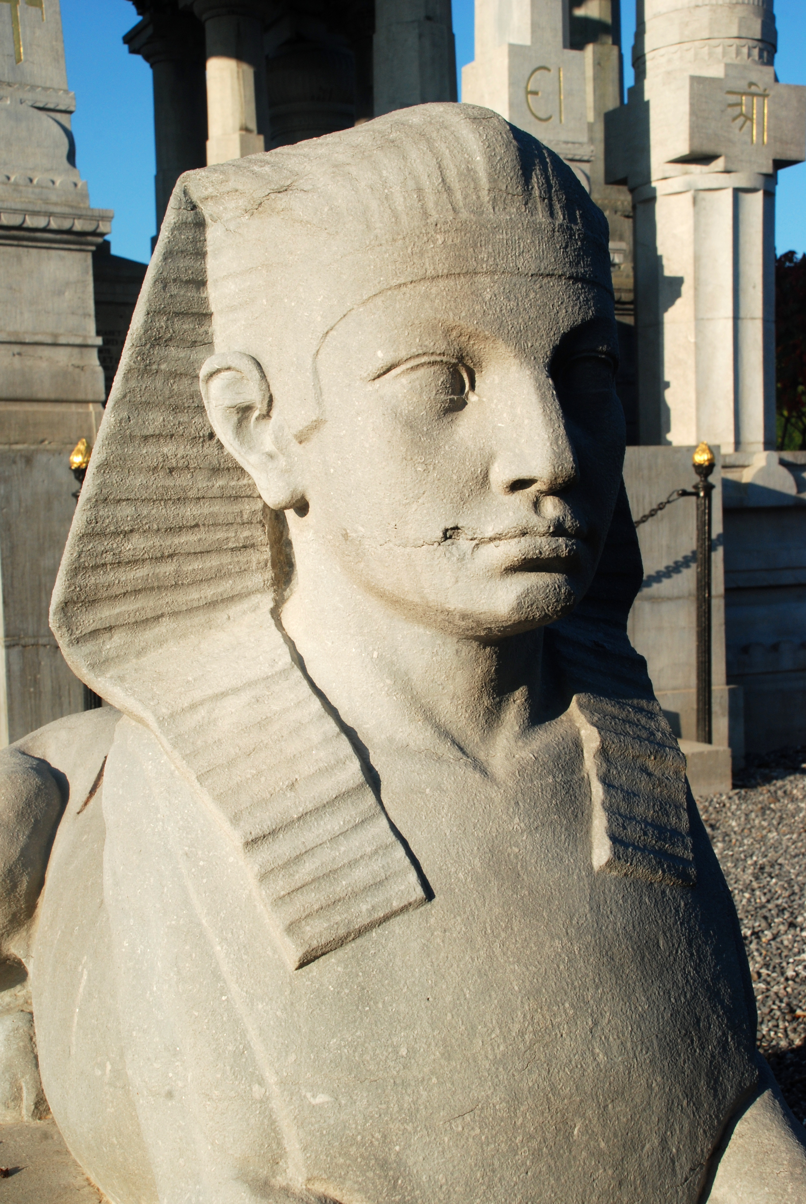 Belgique - Brabant wallon - Court-Saint-Étienne - Mausolée Goblet d'Alviella